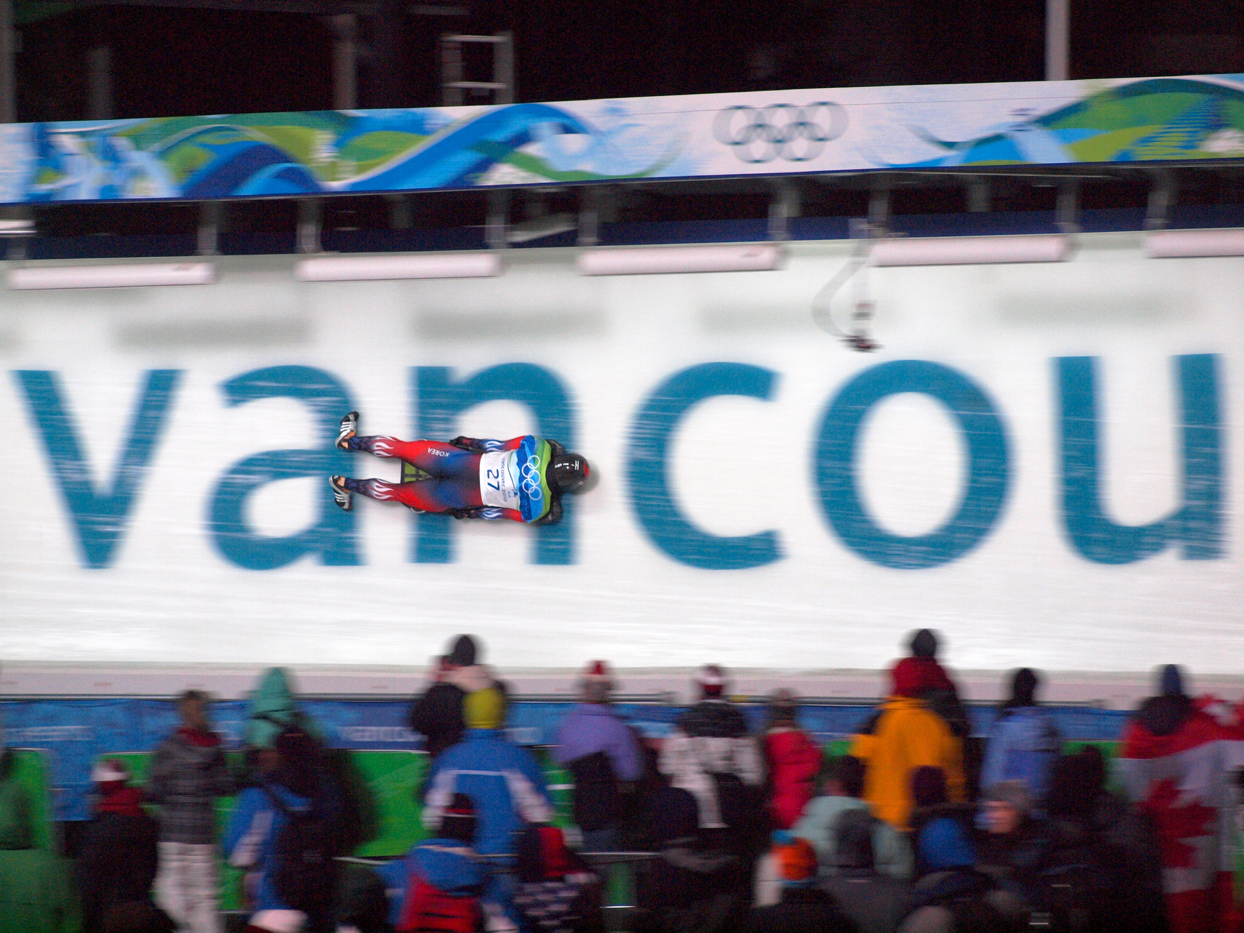 der südkoreanische Skeletonpilot In-ho Cho beim Training während der Olympischen Winterspiele 2010 in Vancouver